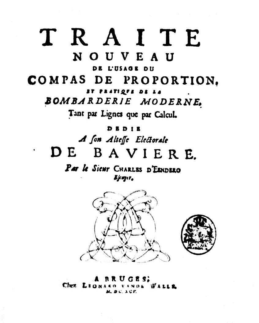 Traité nouveau de l'usage du compas de proportion, et pratique de la bombarderie moderne, ... par le sieur Charles D' Eendero …. - A Bruges : chez Leonard van de Walle, 1695. - [16], 199, [7] p., 24 c. di tav. : ill. ; 4º .